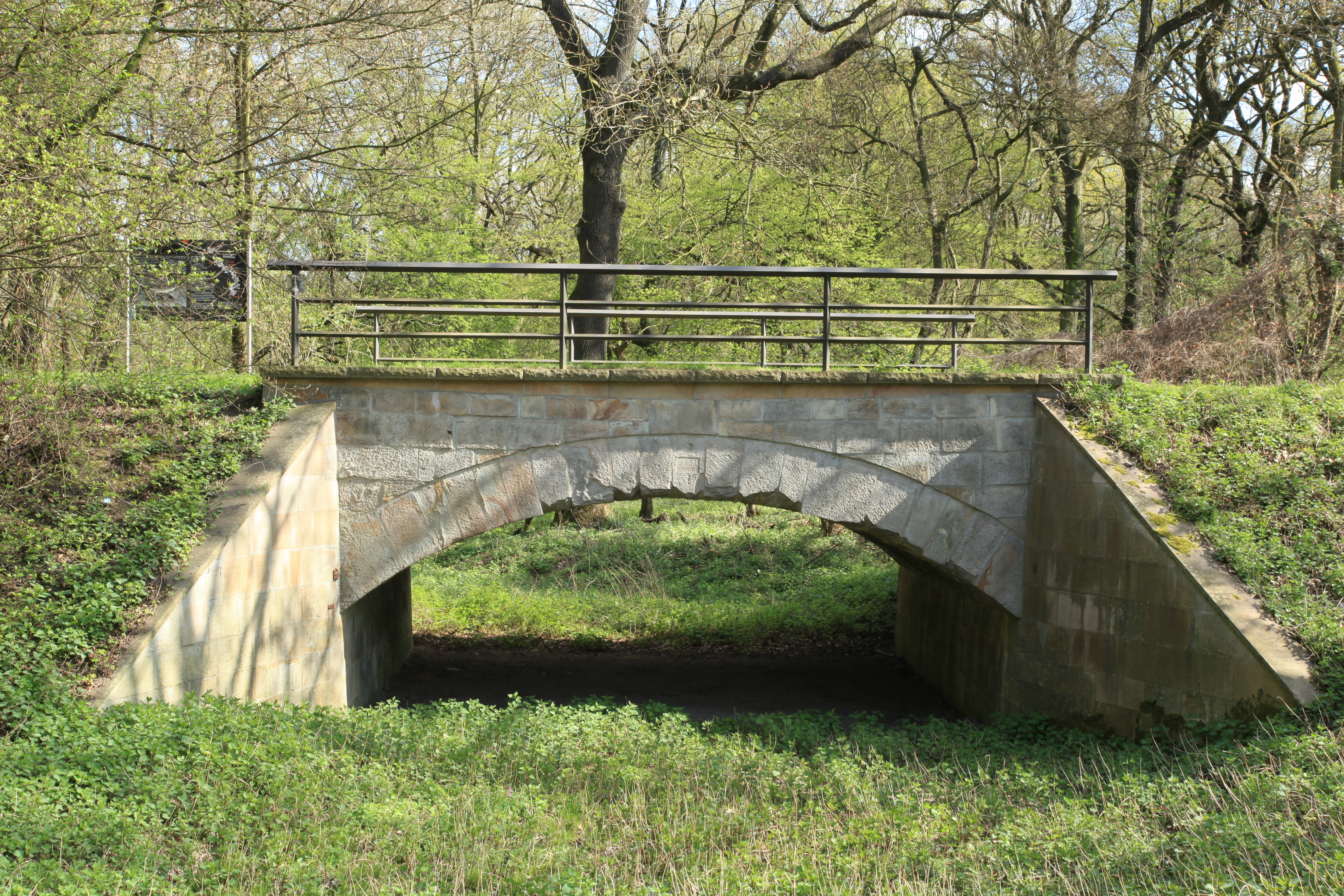 Fleuthebrücke an der Willy-Brandt-Allee, Grenze von Gelsenkirchen und Herne